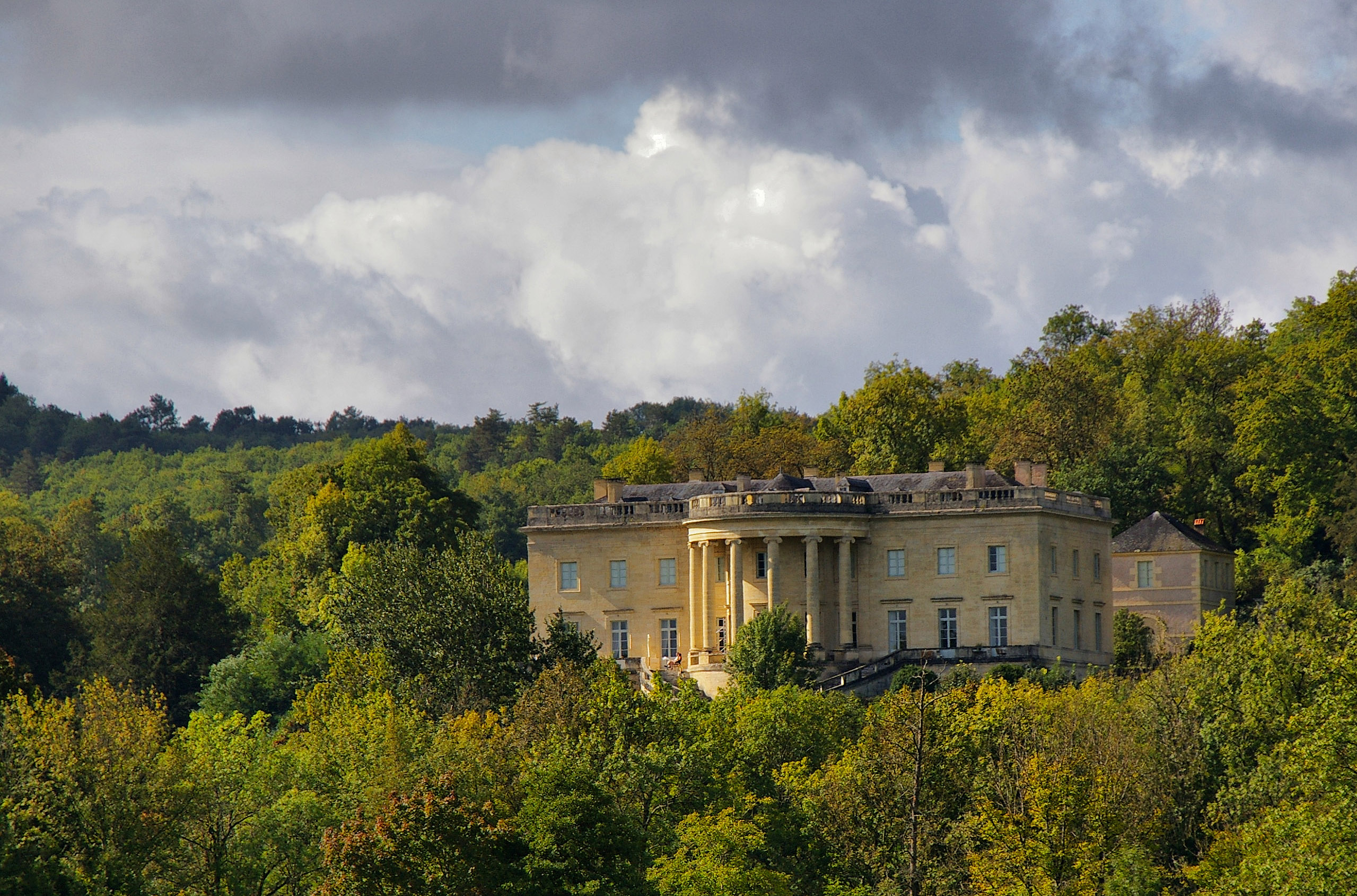 Château de Rastignac sur le plan de la Maison Blanche de Washington